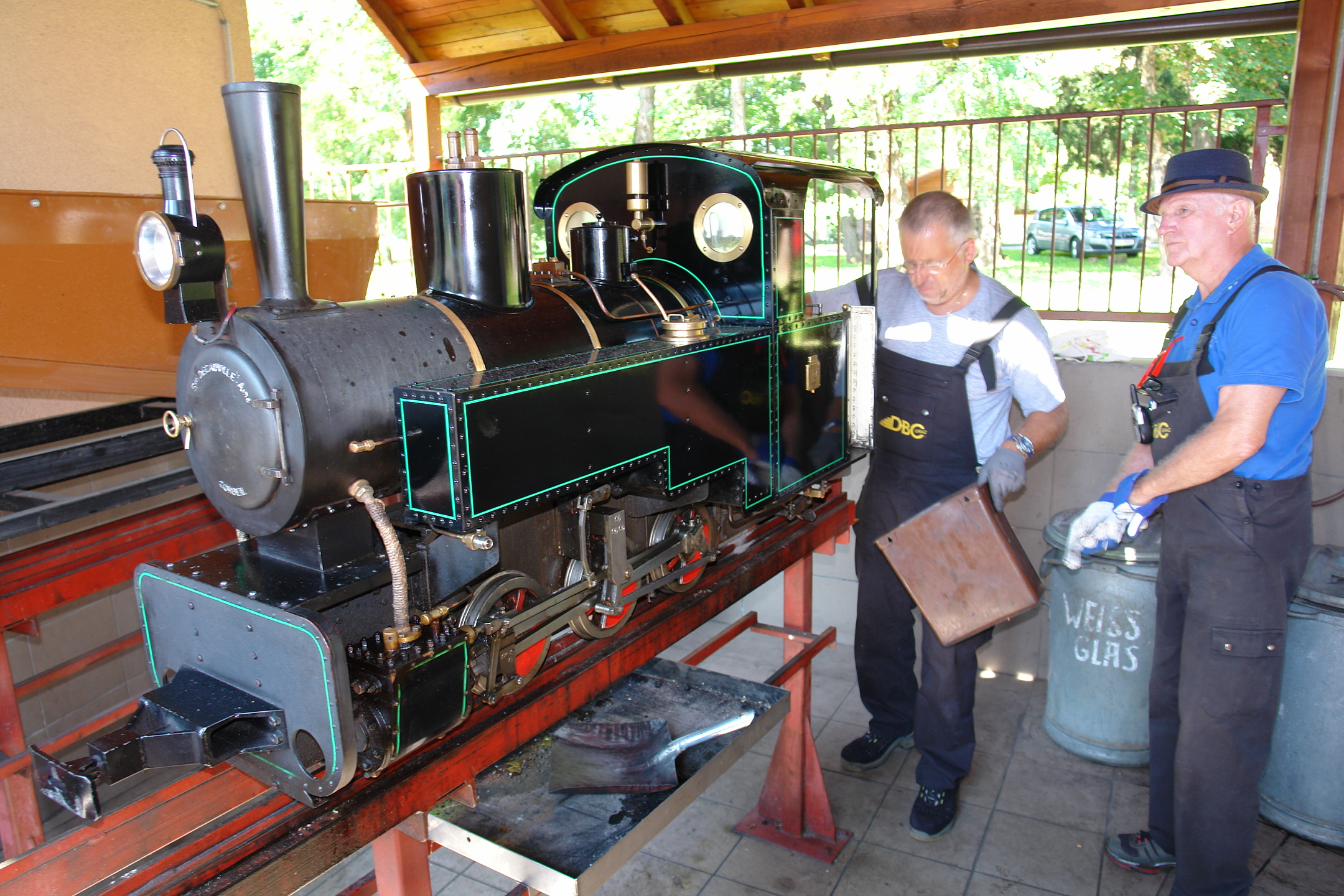 Dampfbahnclub Graz